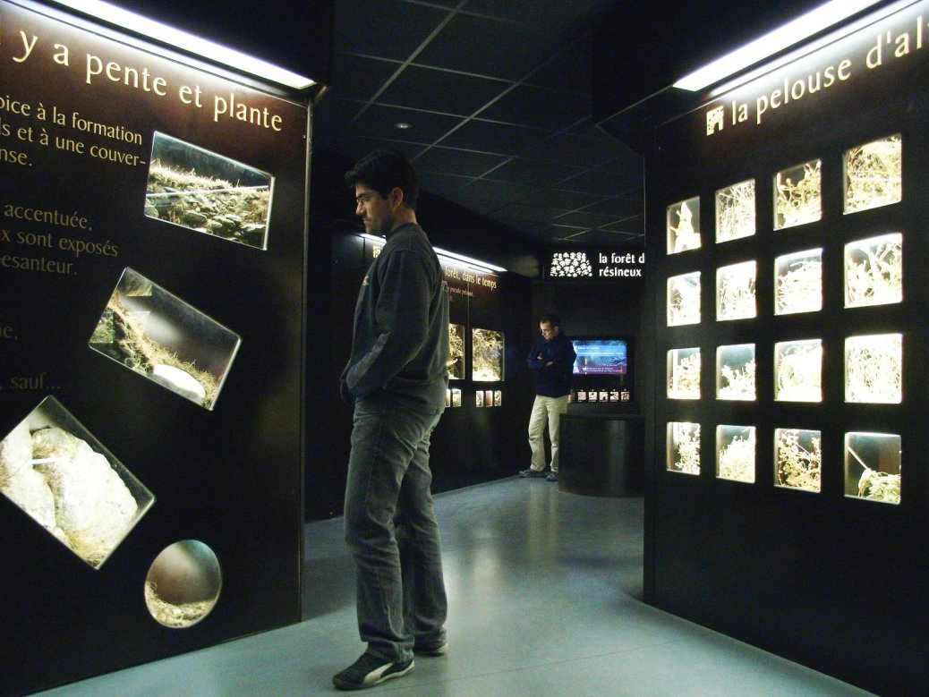 Le musée interactif de l'Observatoire de la montagne. Une approche sensible de la montagne, unique dans les Pyrénées.